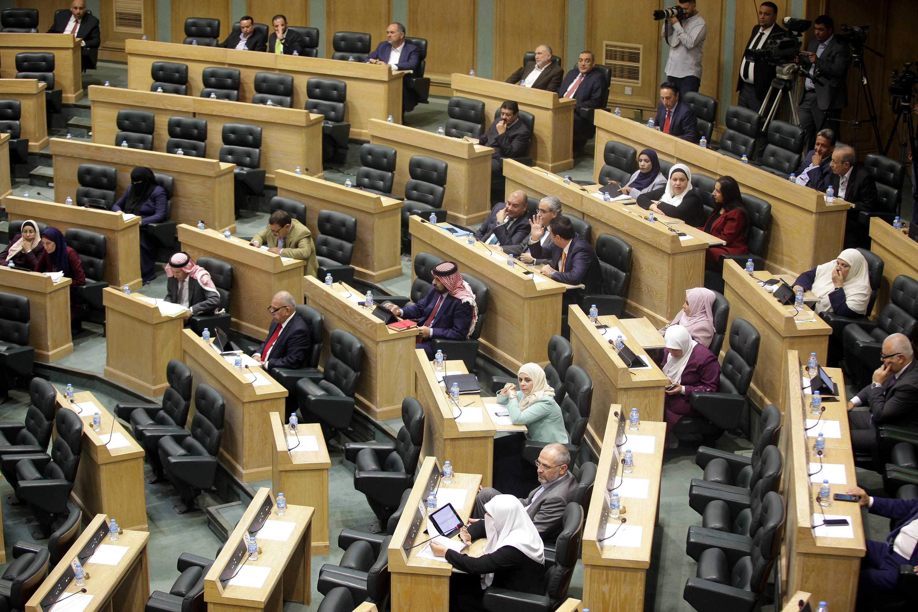 جلسة مجلس النواب الأردني ليوم 16 سبتمبر 2018 تصوير أحمد عبده الشركة الأردنية للصحافة والنشر الدستور ا